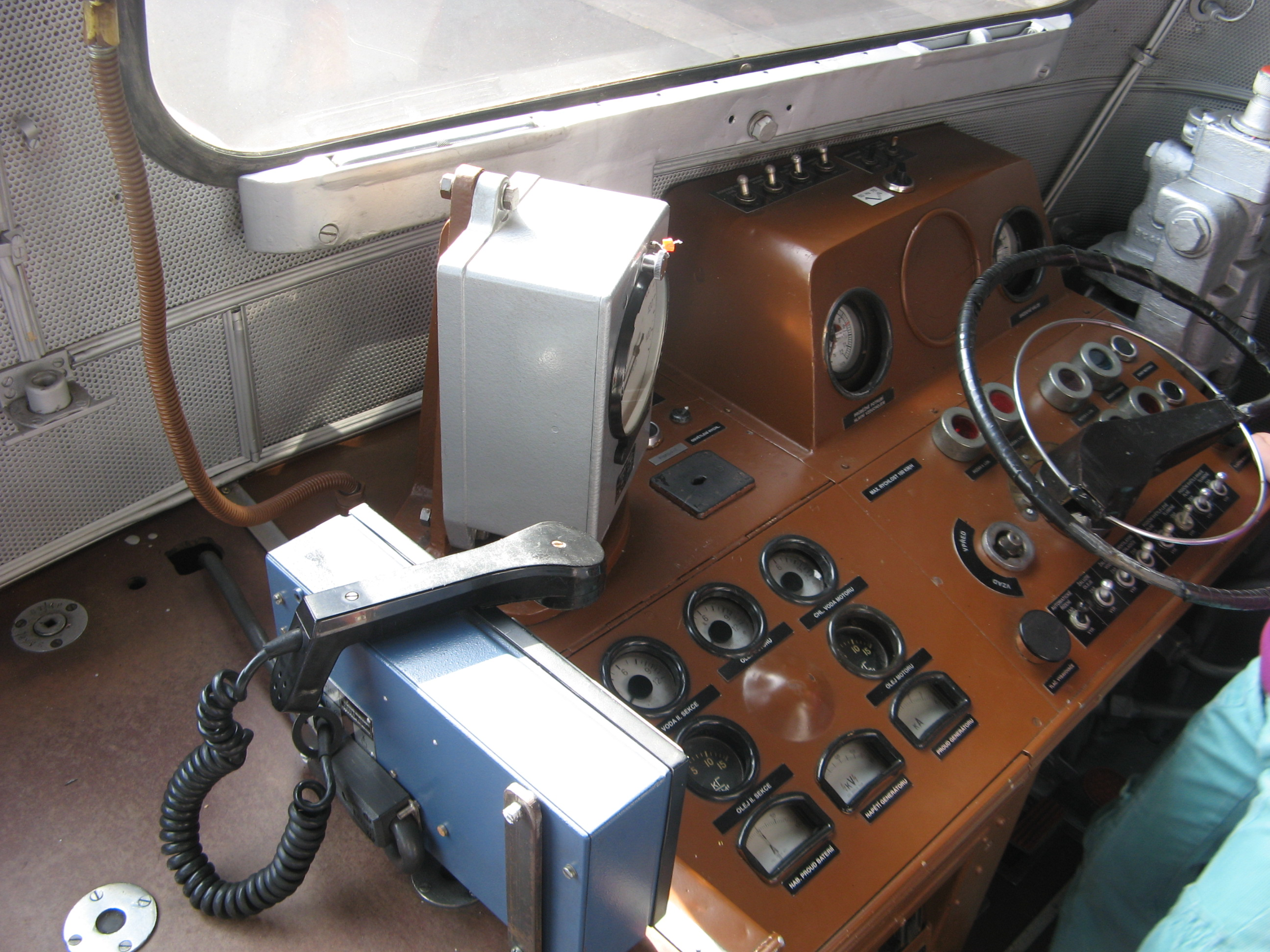 Kabina lokomotivy T679.1